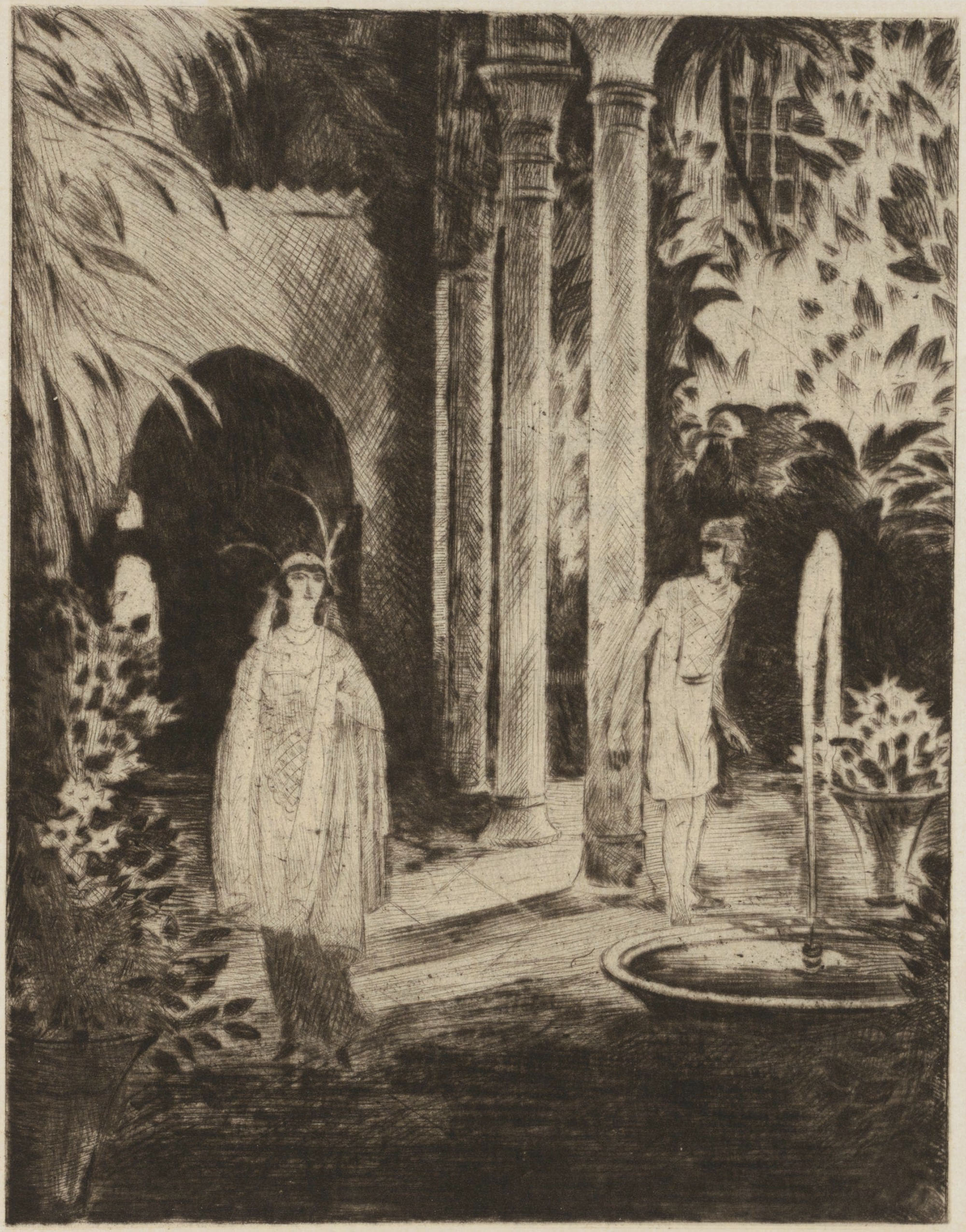 Illustration zu Heinrich Heines Gedicht Der Asra